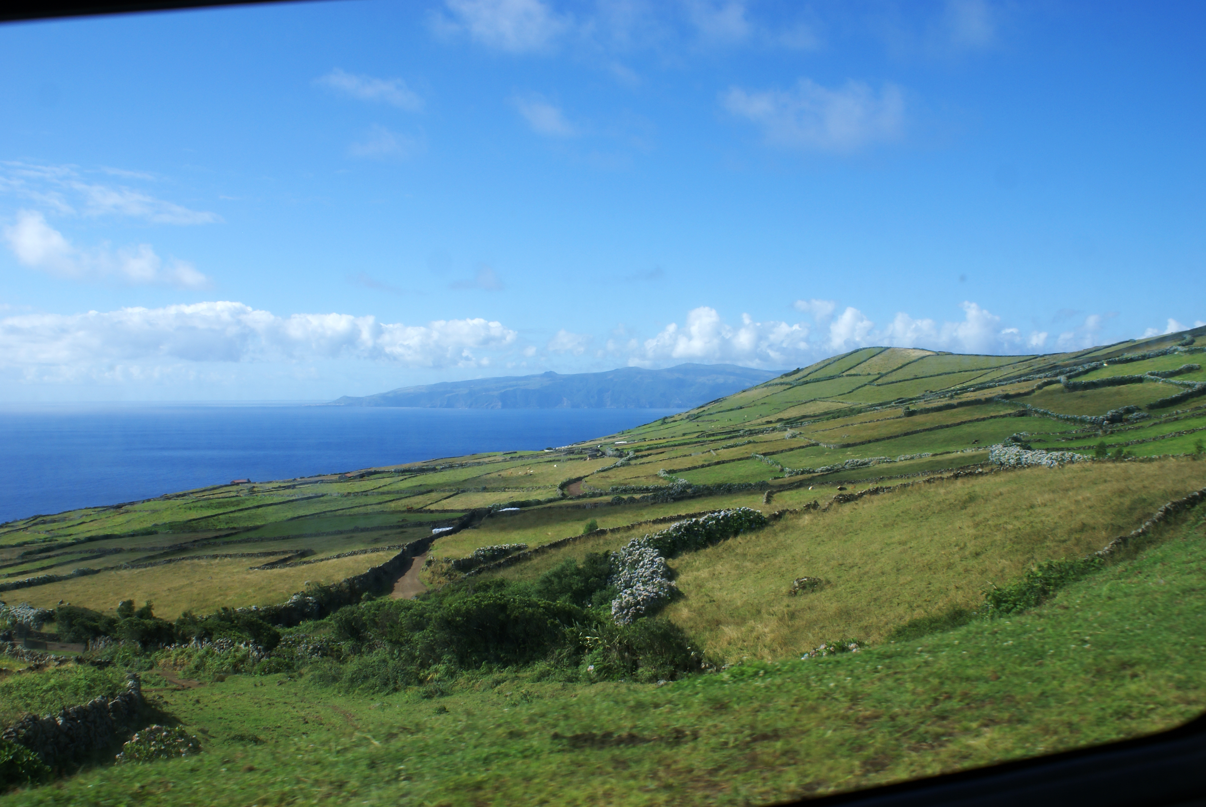 Ilha do Corvo Açores, paisagens, Arquivo de Villa Maria, ilha Terceira, Açores